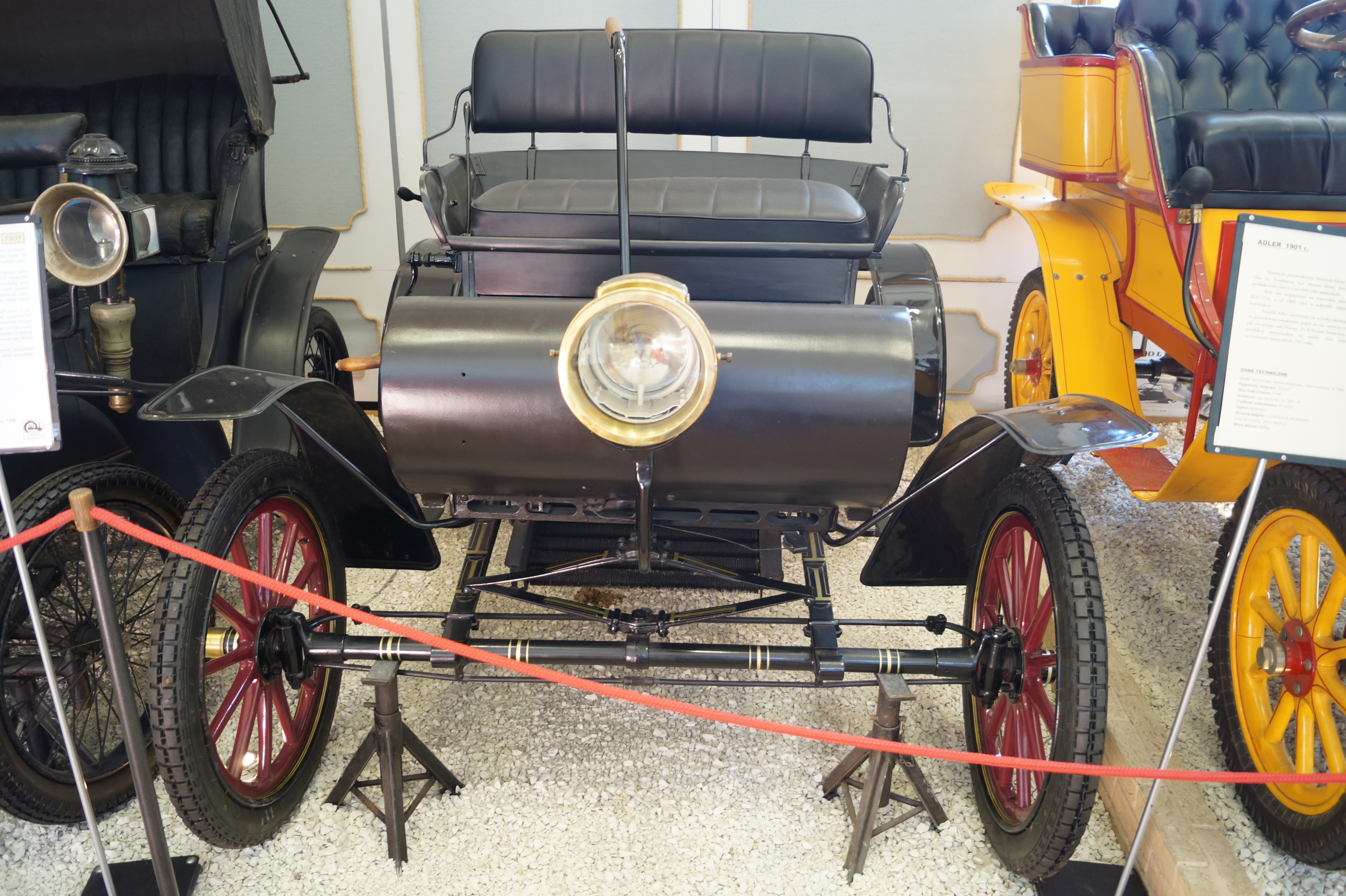 This photo was taken during Automotive Wikiexpedition 2016 set up by Wikimedia Polska Association.You can see all photographs in category Wikiekspedycja motoryzacyjna 2016. English | Polski | +/− Samochód Odlsmobile z 1901 roku w Muzeum Nauki i Techniki w Warszawie